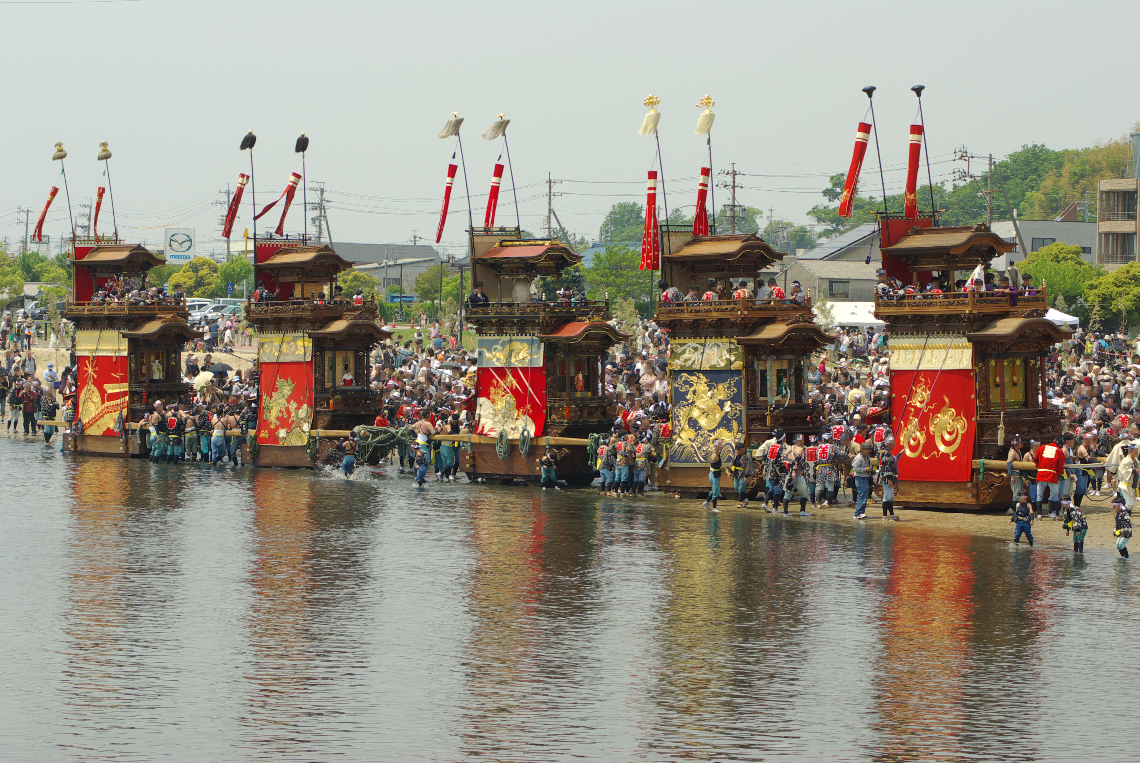 亀崎潮干祭。海岸沿いにそろった山車群。